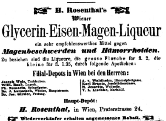 Anzeige für ein Heilmittel in der "Allgemeine Wiener medizinische Zeitung" von 1865